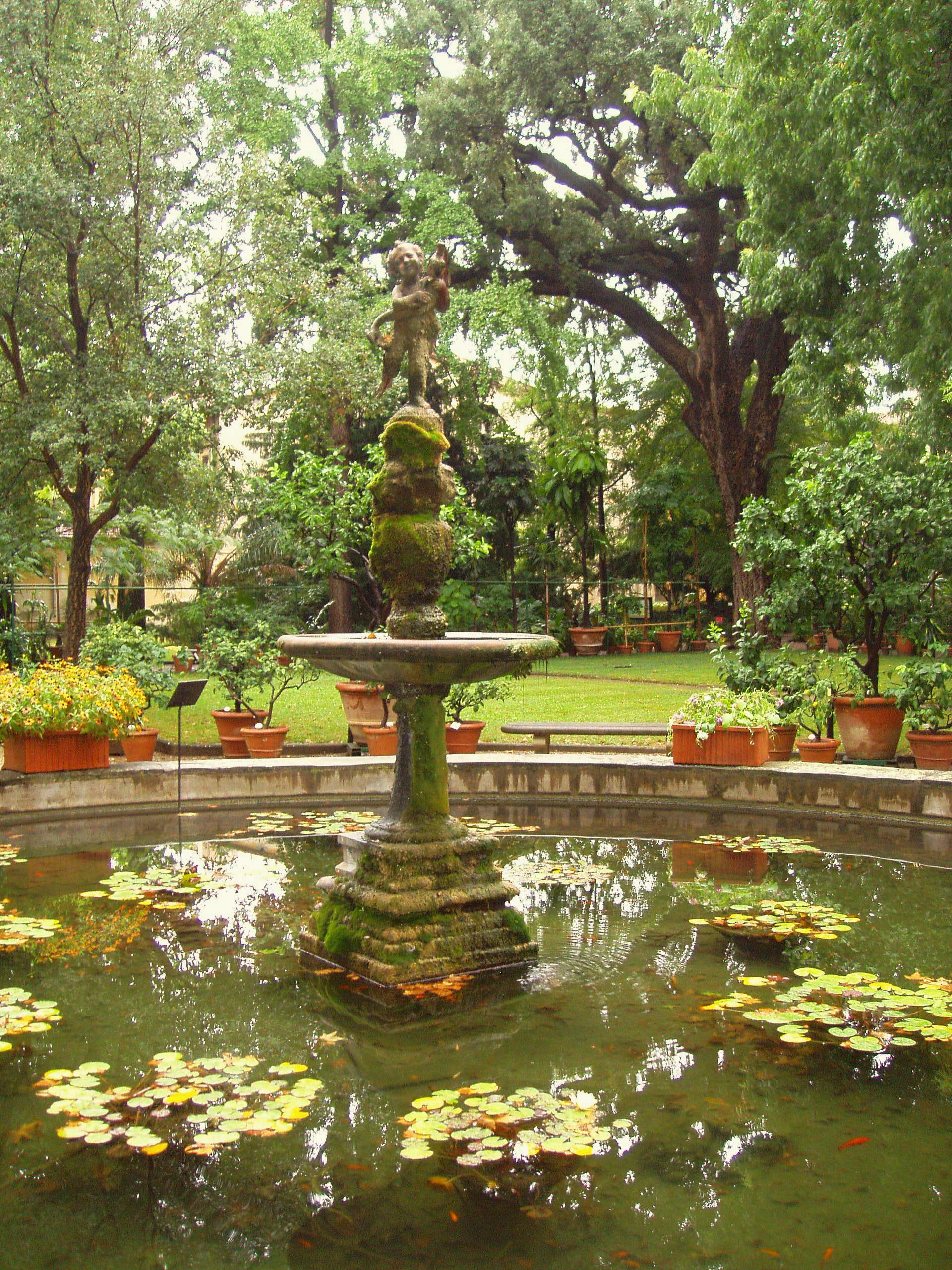 Giardino dei Semplici di Firenze (Orto Botanico di Firenze) - fountain. Florence, Italy.